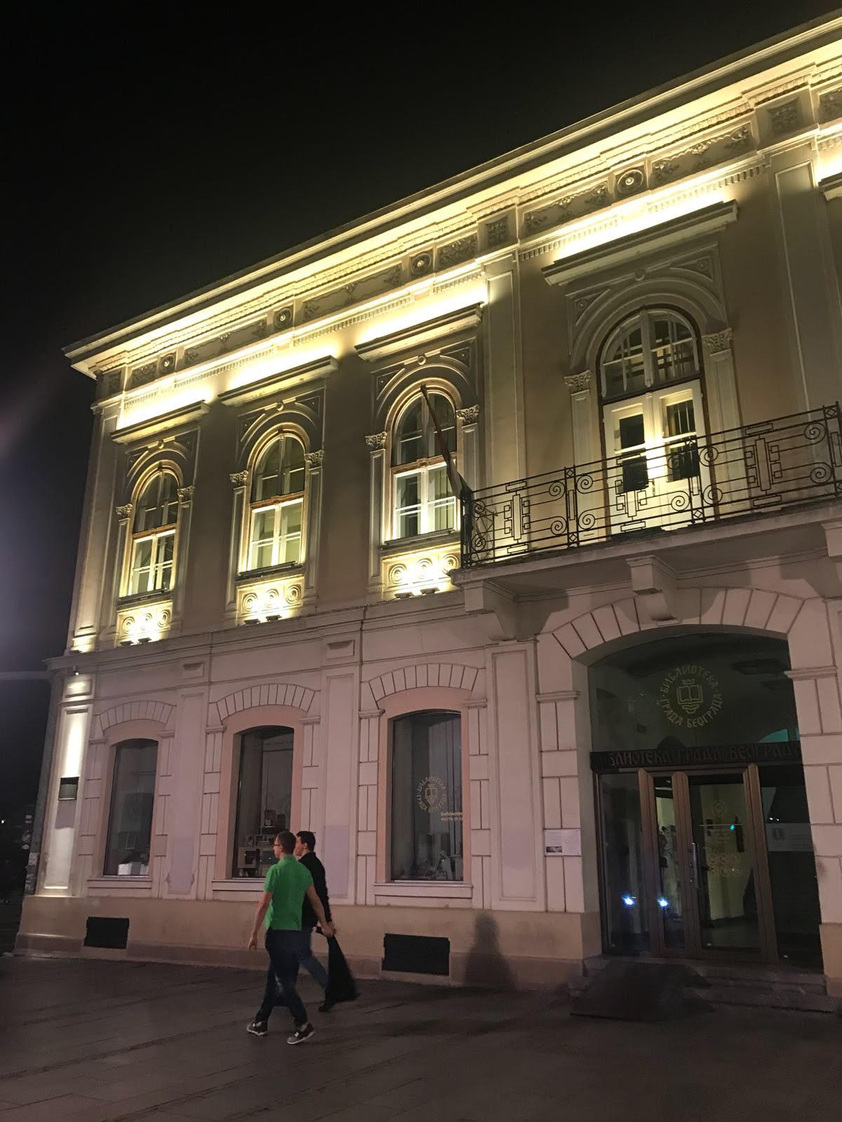 Библиотека града Београда